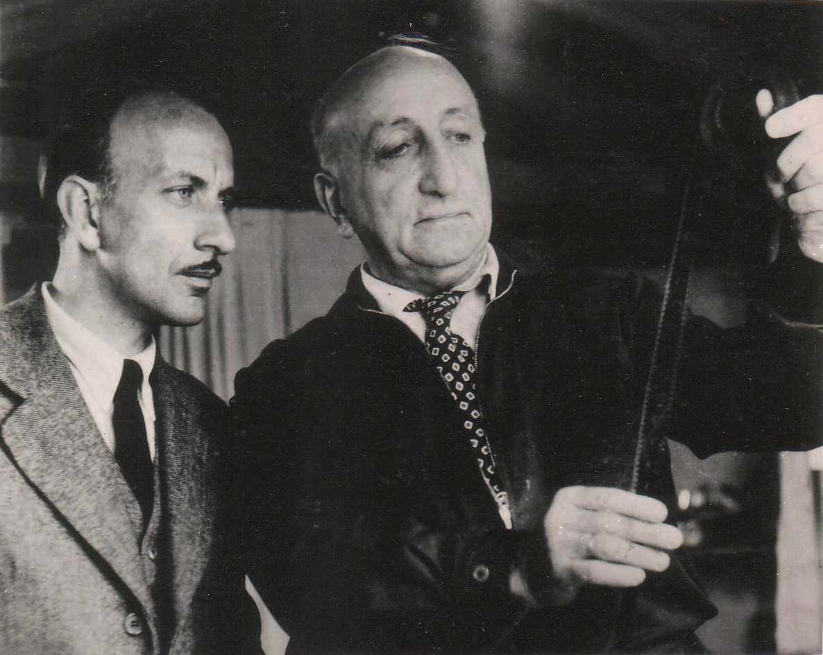 Beschreibung: Karl Ritter mit seinem ältesten Sohn Heinz (1912-1958) während der Dreharbeiten von Ball der Nationen (1954). Heinz und Ted Kornowicz wirkten als Kammeramänner dieses Films. Quelle: Familienbesitz